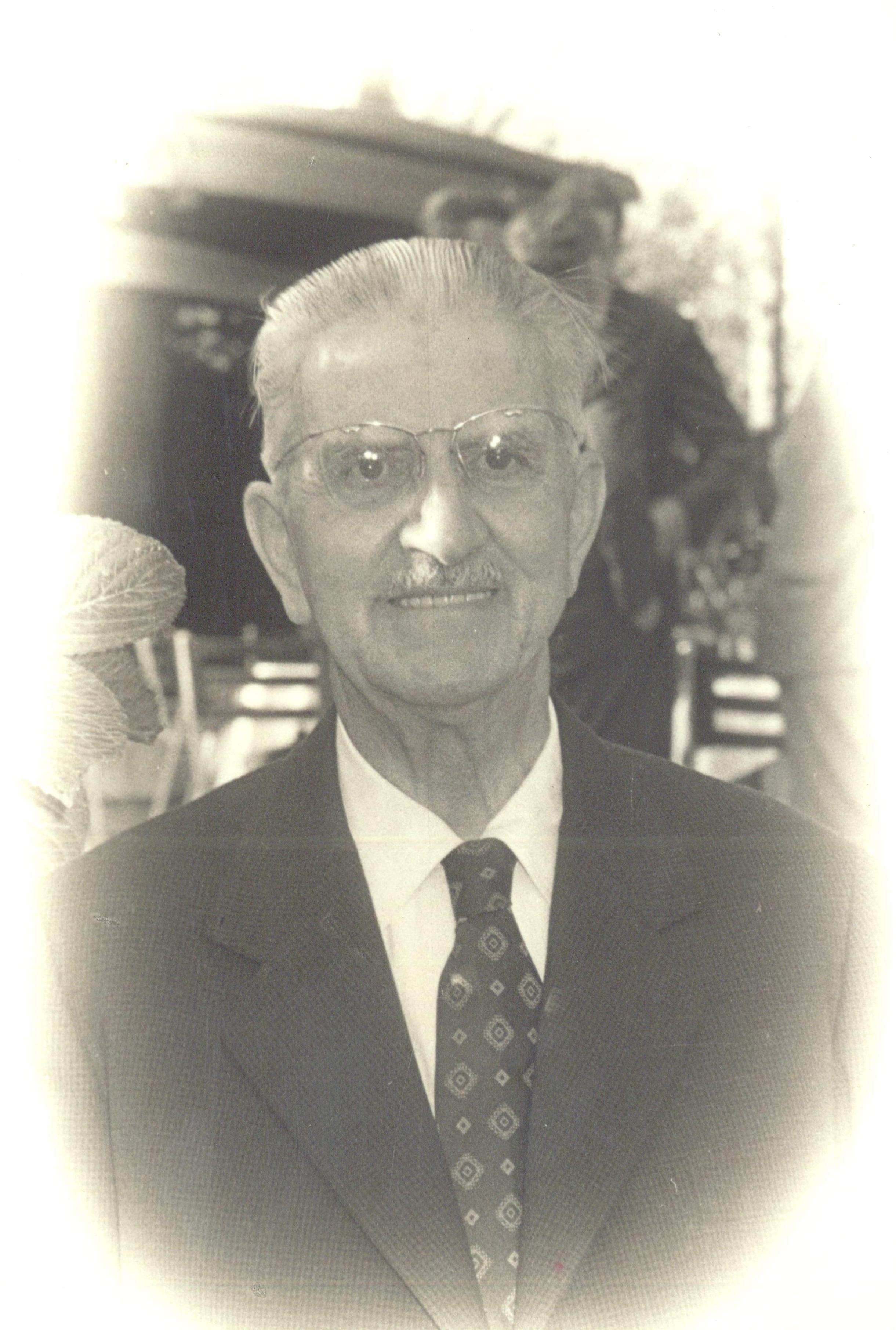 Bodas de oro. Año 1968